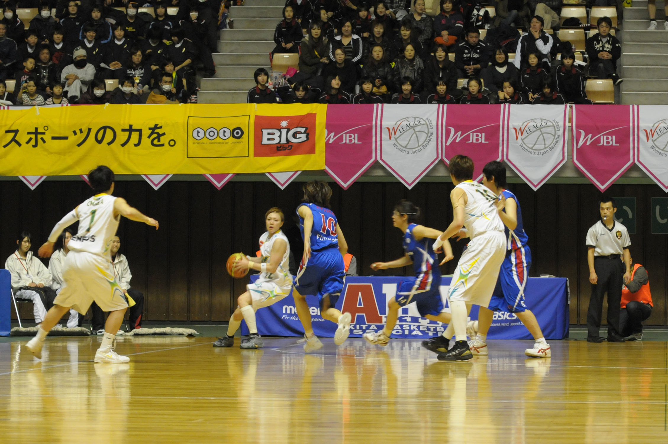 WJBL 12-13プレーオフ・ファーストラウンド、JX対デンソー。秋田県立体育館。